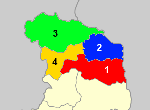 Χάρτης των δημοτικών ενοτήτων (πρώην δήμων και κοινοτήτων) του Δήμου Ορεστιάδας.